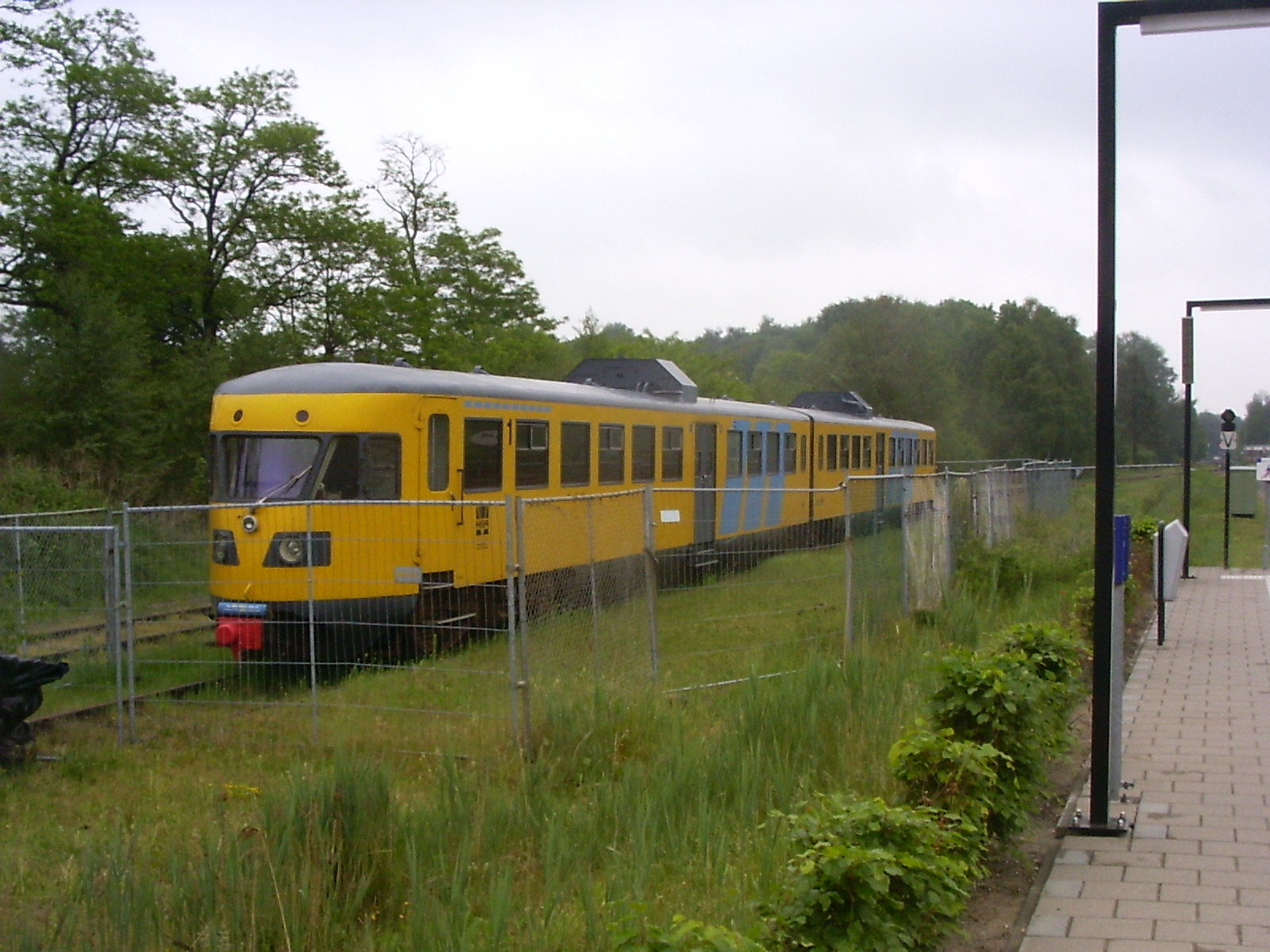 Voormalige blauwe engel (DE2) op emplacement Winterswijk